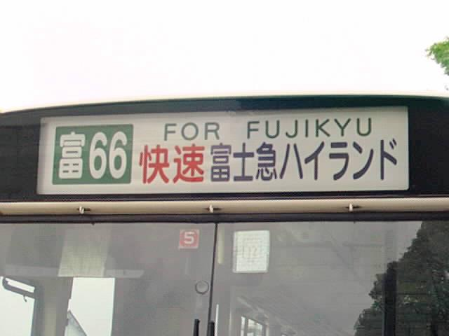 富士急静岡バス 富66 富士急ハイランド行きの正面行先表示。ローマ字表記が「FOR FUJIKYU」となっている。